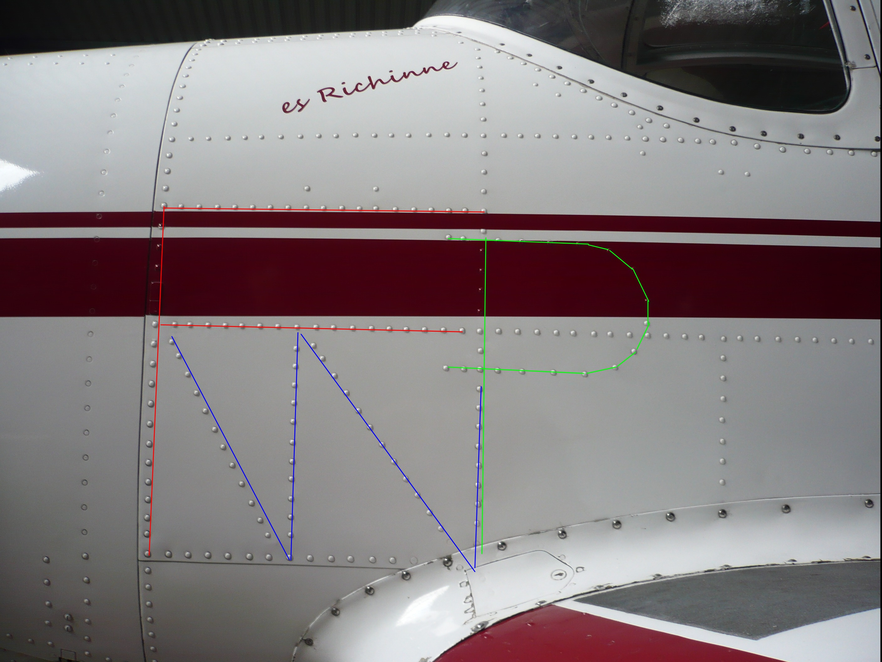 de: Seitenansicht der Vernietung aus der Ersichtlich wird, dass es sich um einen deutschen Lizenzbau von Focke-Wulf handelt. en: Side view of fuselage where you can see, that this aeroplane was built by Focke-Wulf in germany